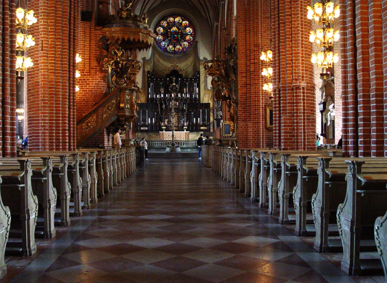 Storkyrkan in Stockholm, Schweden.